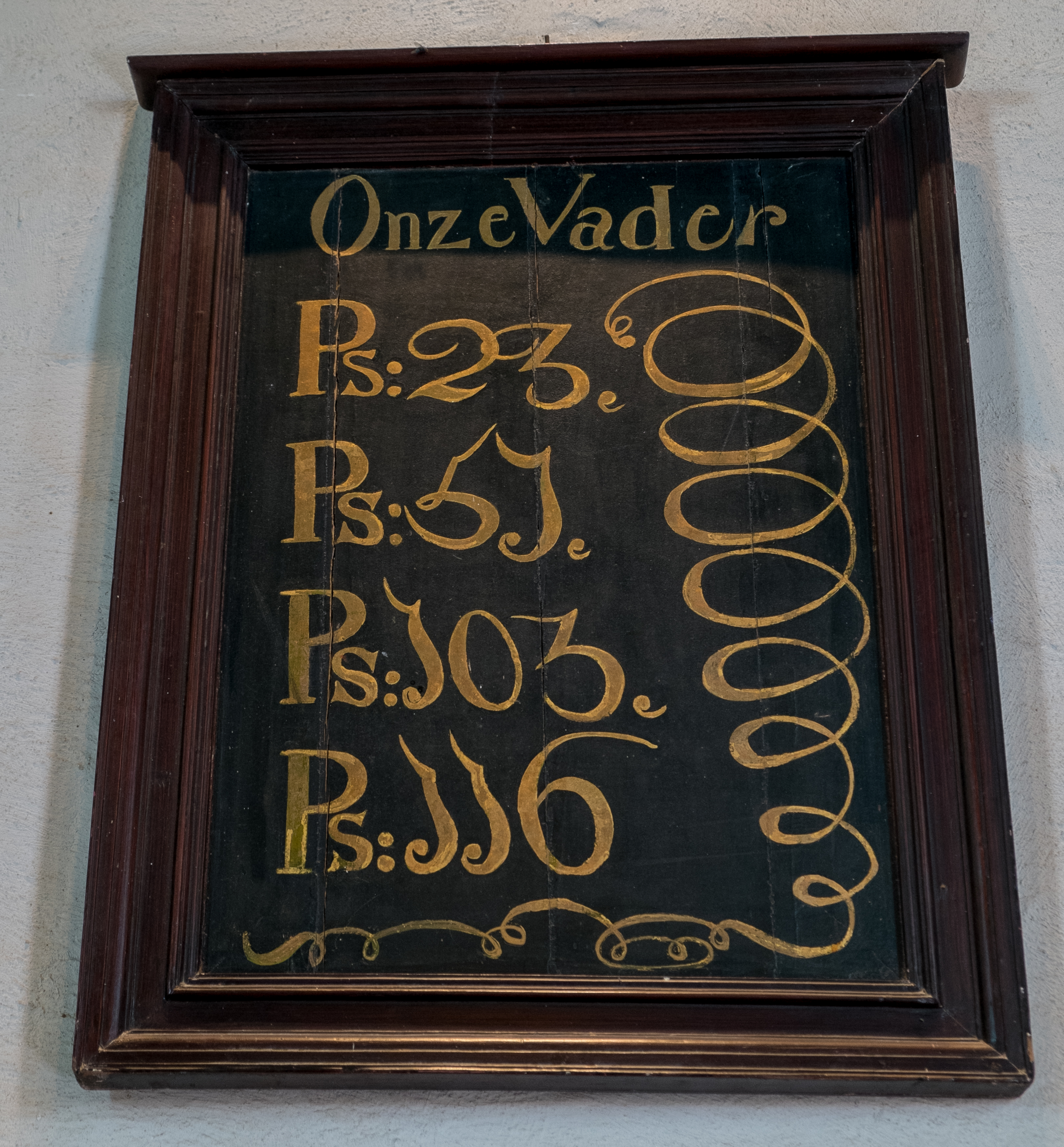 avondmaalsbord in de kerk van Leegkerk